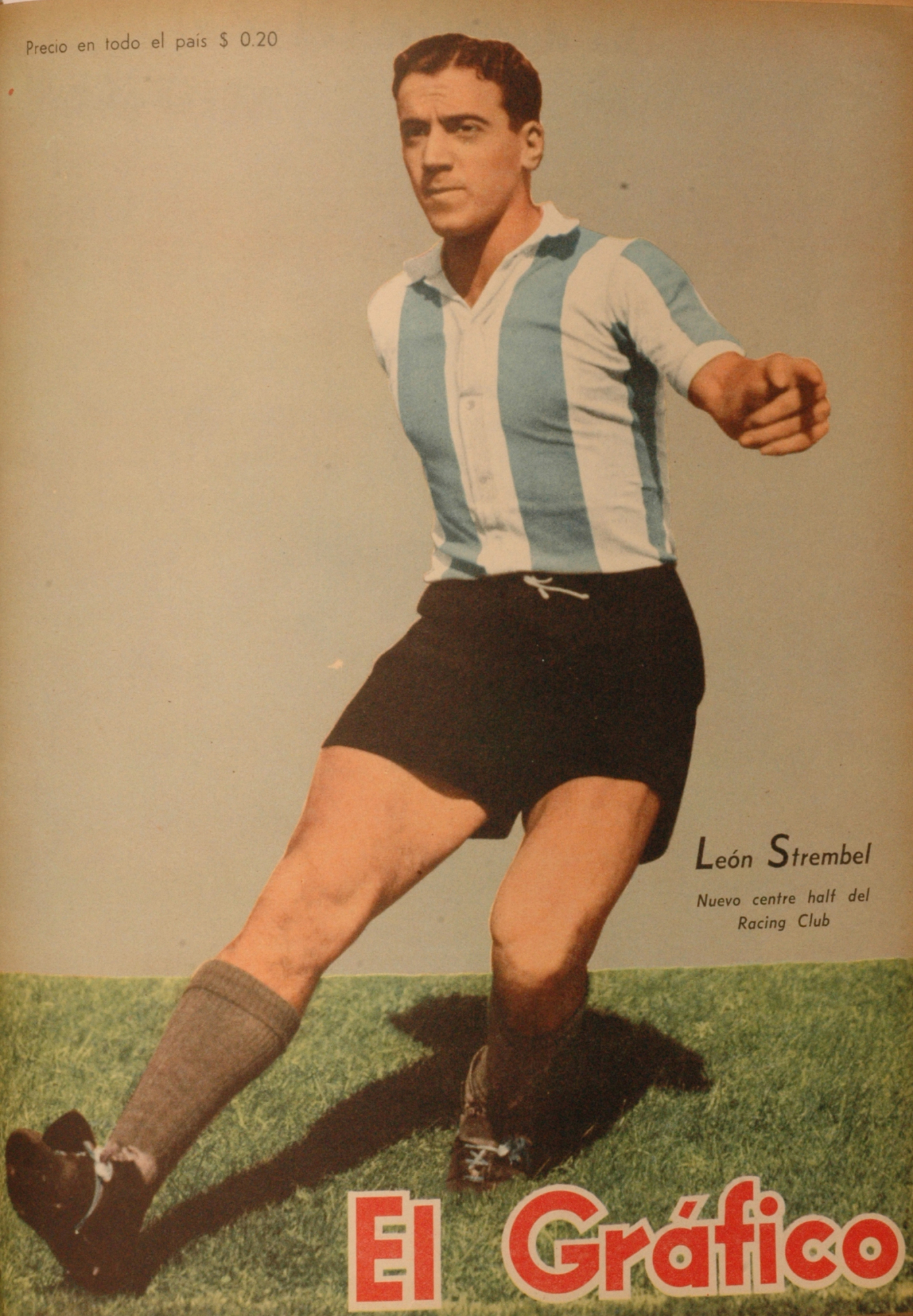 El Grafico del 13 de Abril de 1945. Edicion 1344